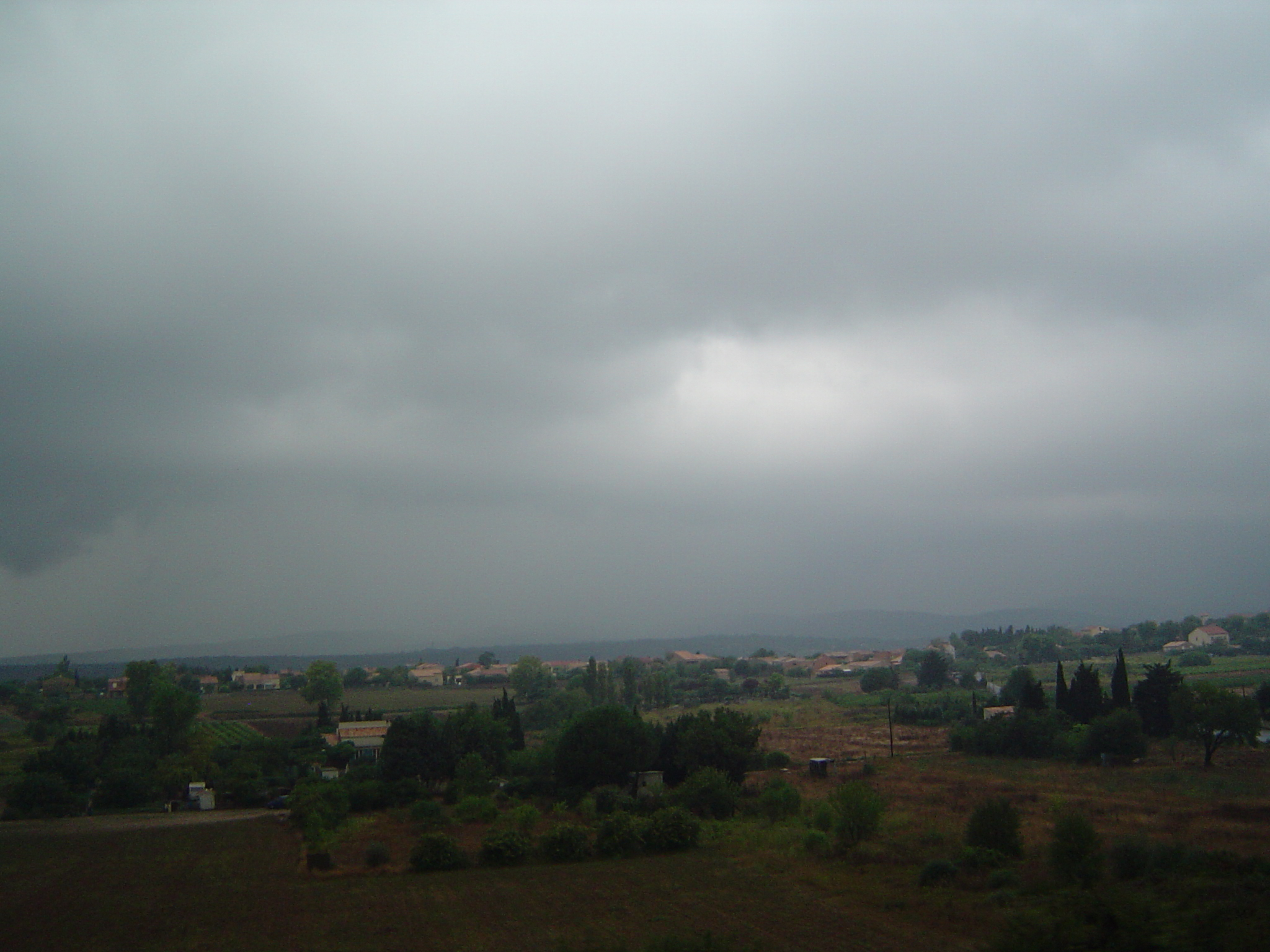 Photo du ciel pendant un épisode cévenol qui toucha les département de l'Hérault et du Gard, le 06/09/2005 2005. Cevenol2